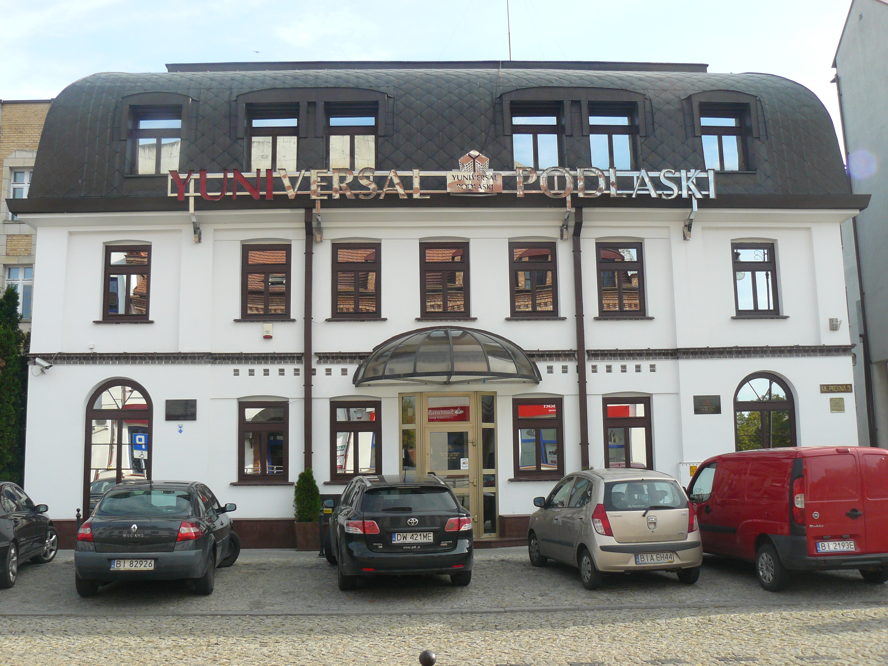 Białystok, ul. Piękna 3 - dawny Dom Modlitwy "Bejt Midrasz Piaskower", obecnie biura (zabytek nr A-202 z 27.09.1988)